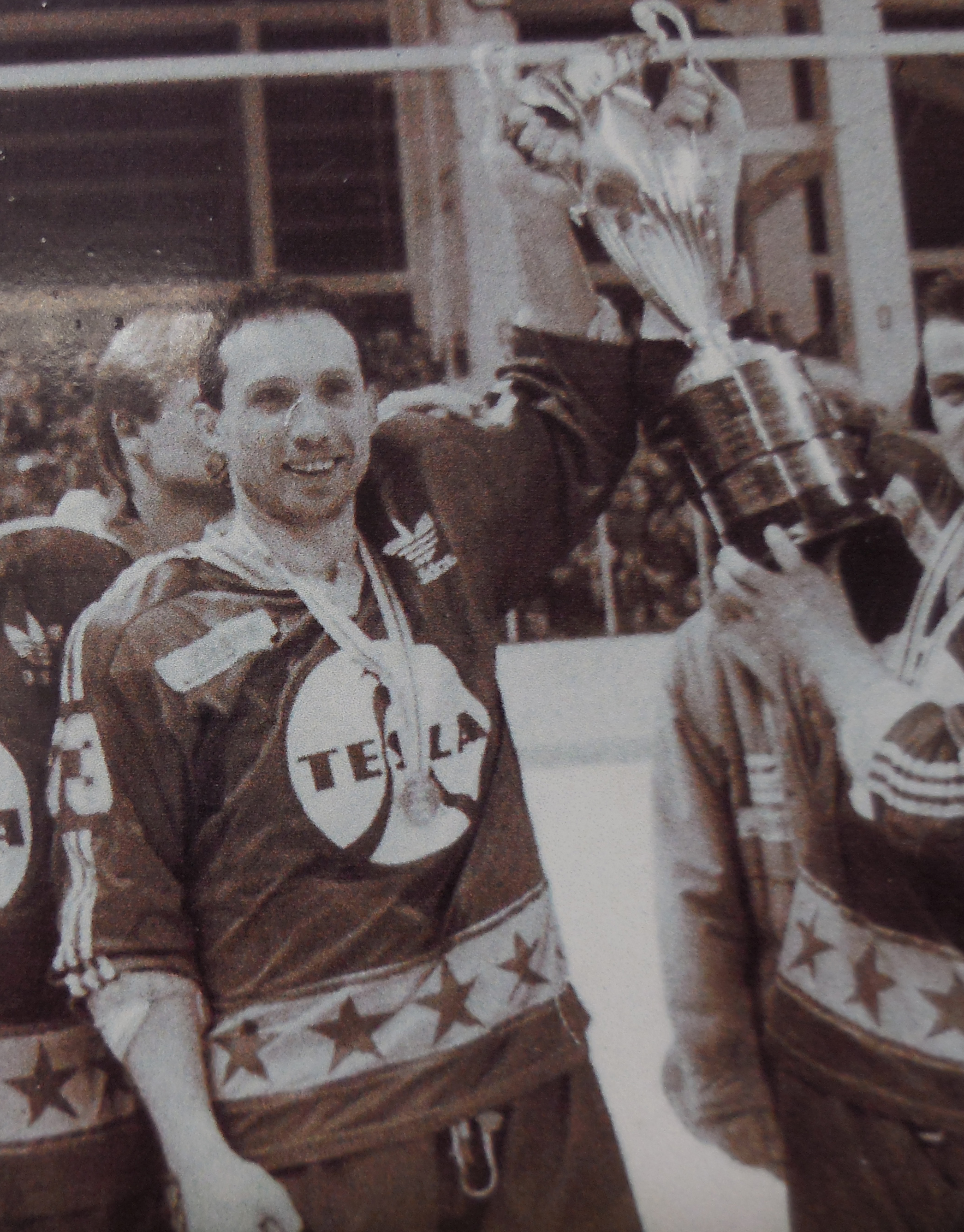 Oslava titulu v Československé hokejové lize v roce 1988/89